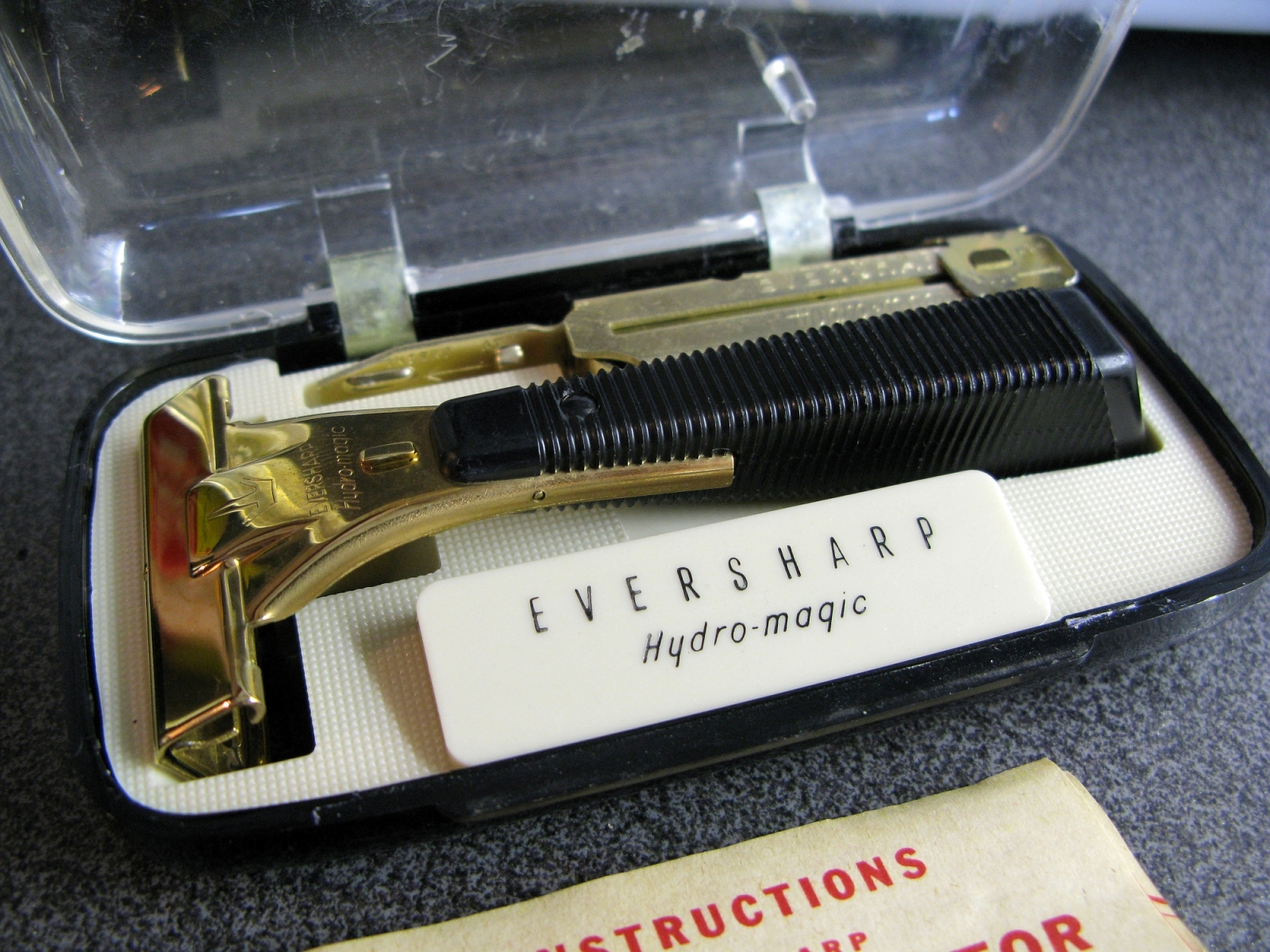 Schick Eversharp Hydromagic Injector Rasierhobel ja